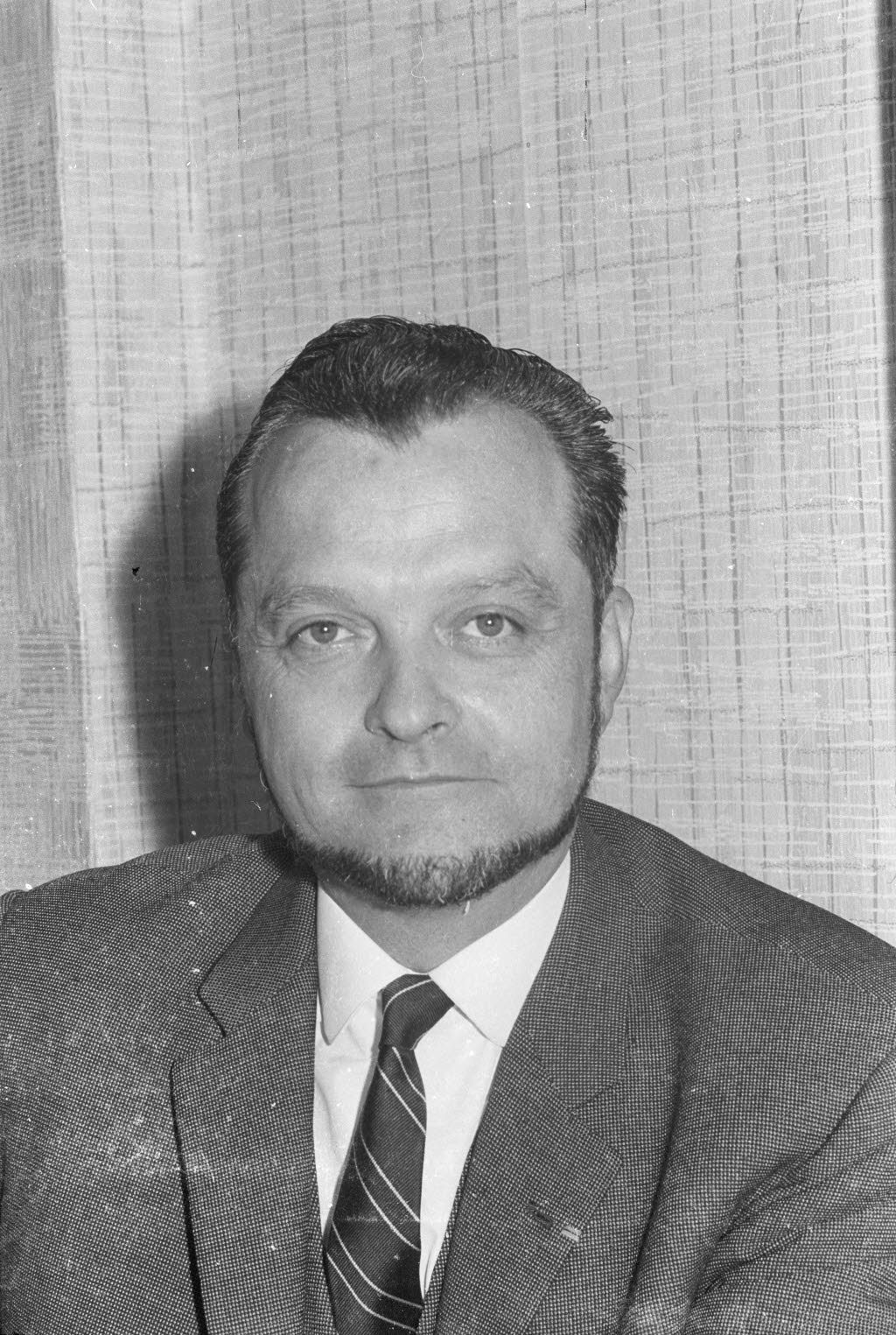 Oberbürgermeister von Kiels Partnerstadt Brest.